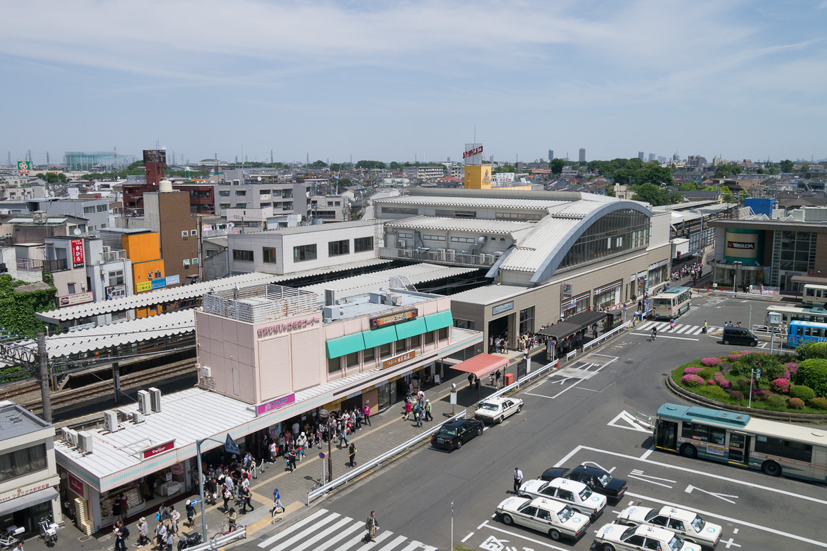 西武鉄道池袋線ひばりヶ丘駅南口。東京都西東京市。